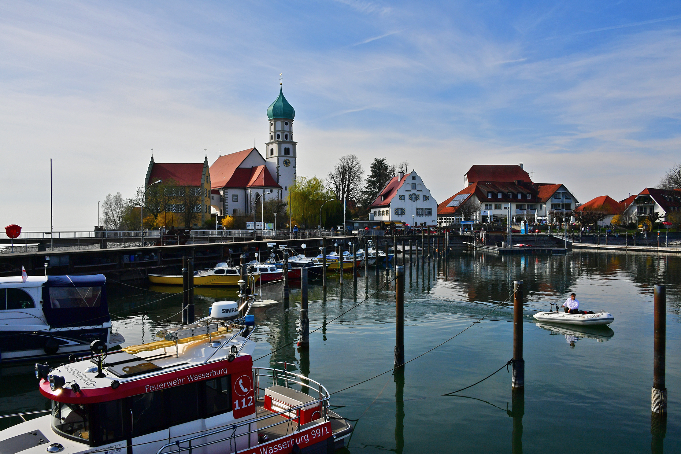 Katholische Pfarrkirche Sankt Georg, Wasserburg (Bodensee)